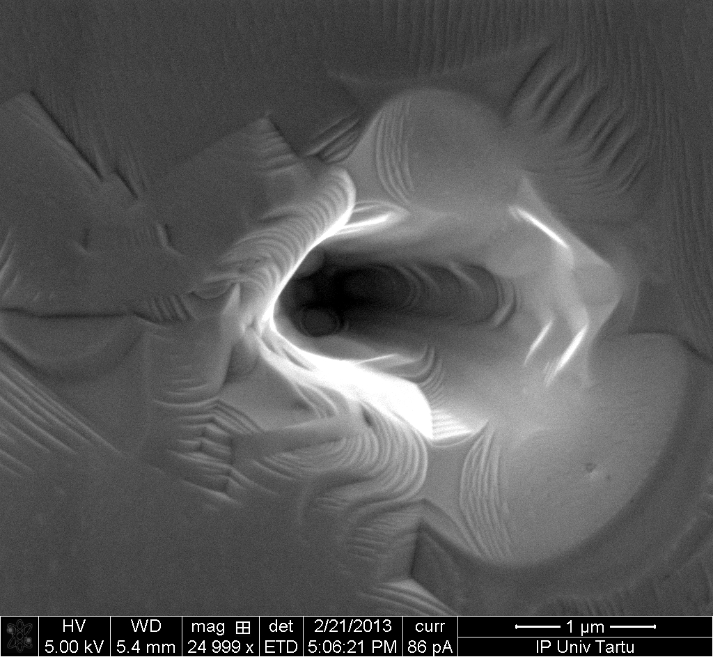 Grafeeni kasvatusel tekkinud defekt -- must auk.